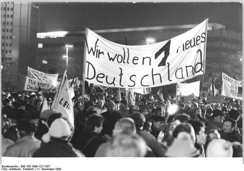 Leipzig, Montagsdemonstration ADN-ZB Gahlbeck 11.12.89 Leipzig: Montags-Demo- Die 10. Montags-Demonstration Leipziger Bürger zur demokratischen Erneuerung der Republik vereinte über 100.000 Menschen vor dem Opernhaus. Den Slogan "Deutschland, einig Vaterland" trugen zahlreiche Transparente. Wogegen auf Flugblättern der Sinn eines vereinigten Deutschlands angezweifelt wurde.